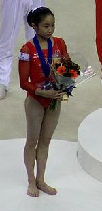 A ginasta Koko, no pódio das assimétricas